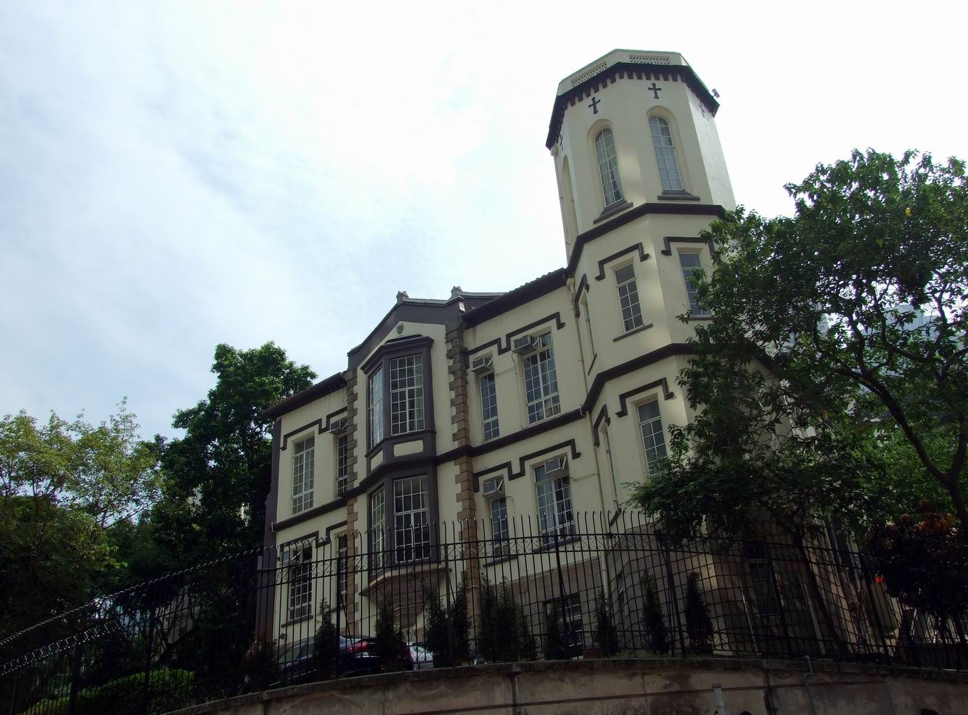 聖公會會督府